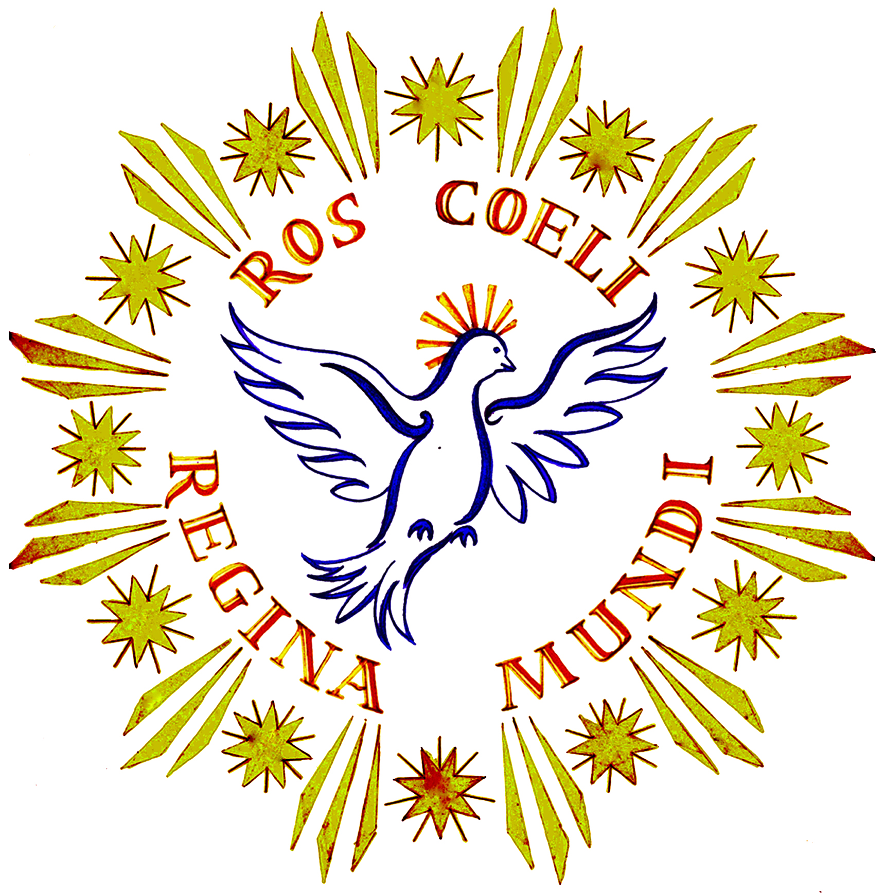 Logo coronacion del Rocío